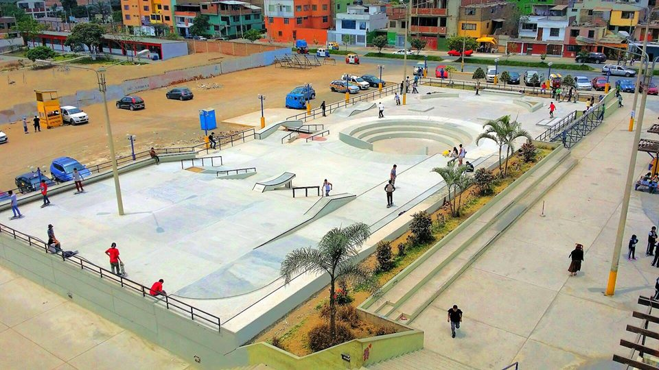 Skateplaza San Juan de Miraflores